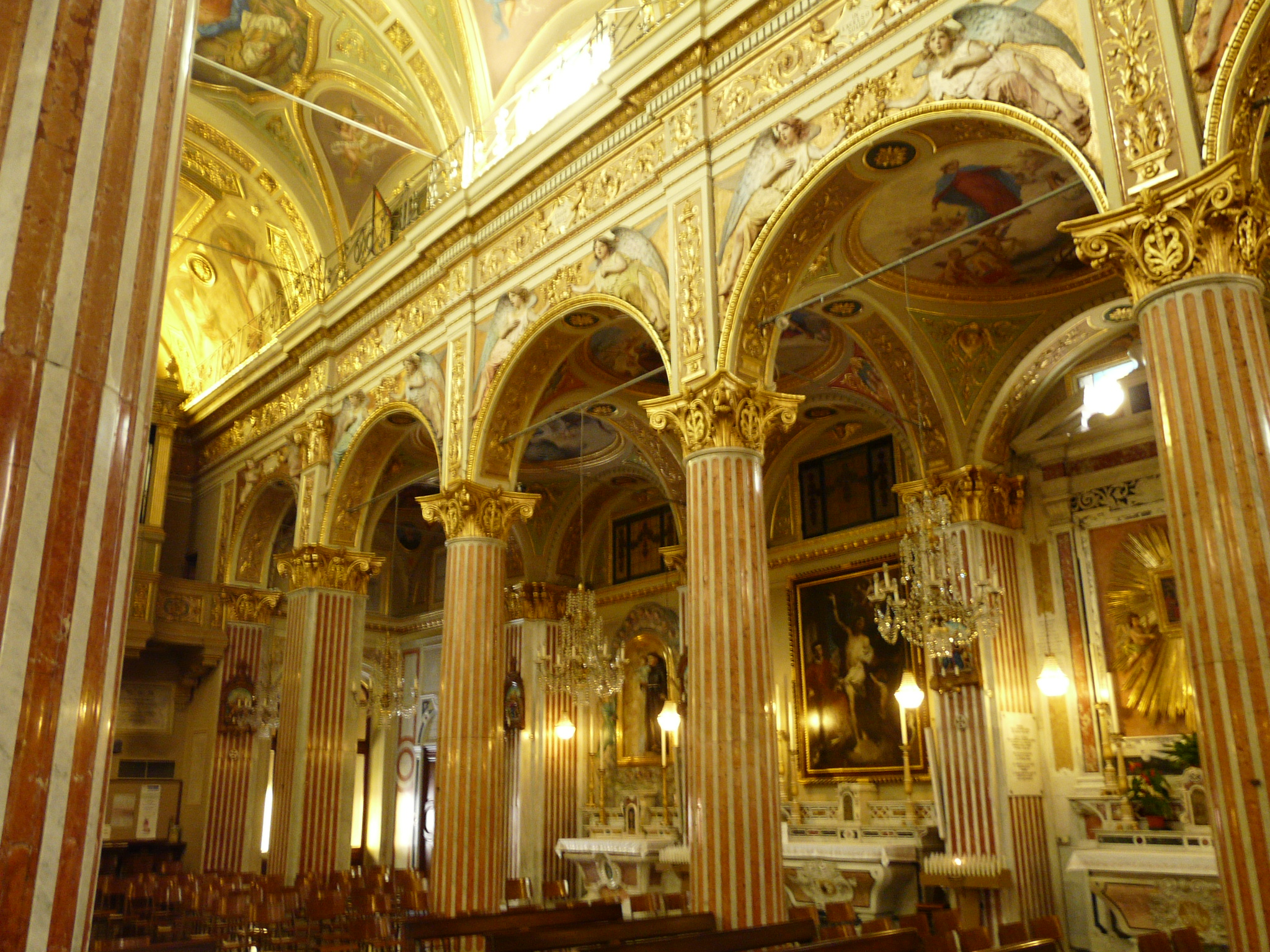 Chiesa di San Siro, Santa Margherita Ligure, Liguria, Italia